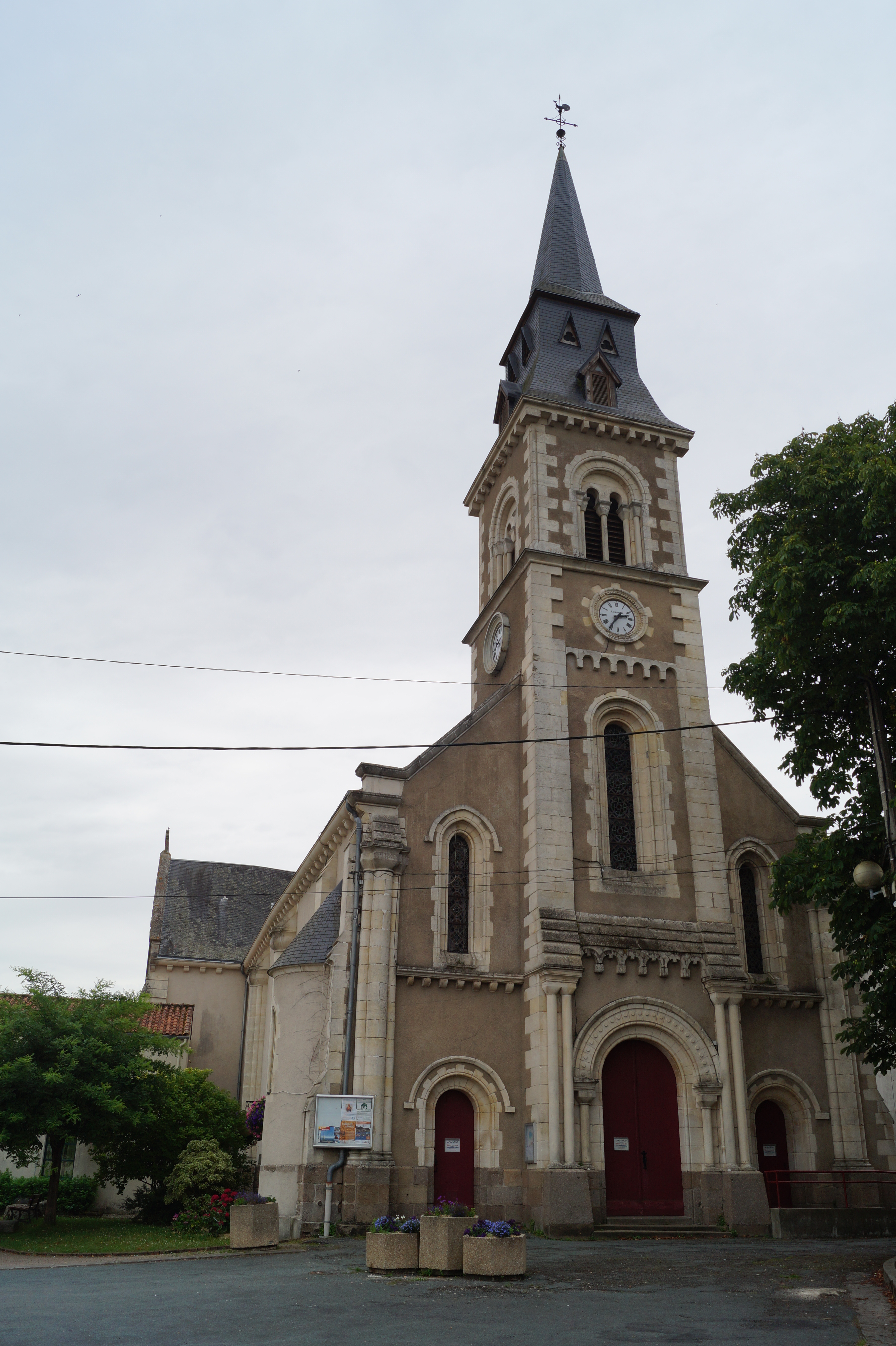 L’église Saint-Florent, à Saint-Florent-des-Bois.